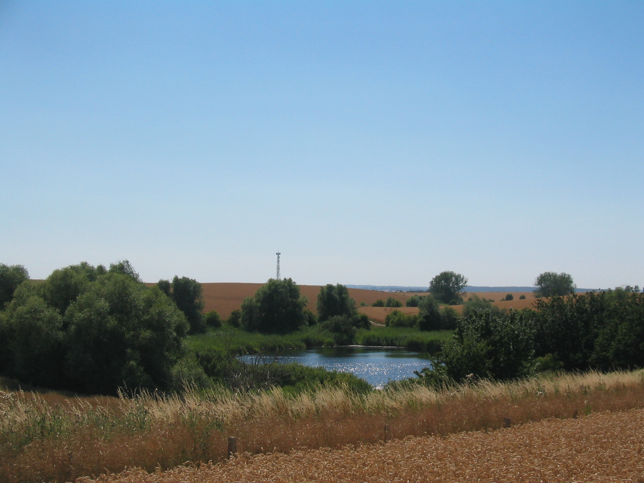 Südkoppelsee bei Grünow